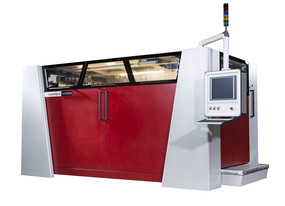 voxeljet 3D-Drucksystem VX2000